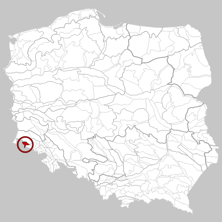 Physico-geographical regionalization of Poland Mezoregion 332.34 Jizera Mountains Regionalizacja fizycznogeograficzna Polski Mezoregion 332.34 Góry Izerskie